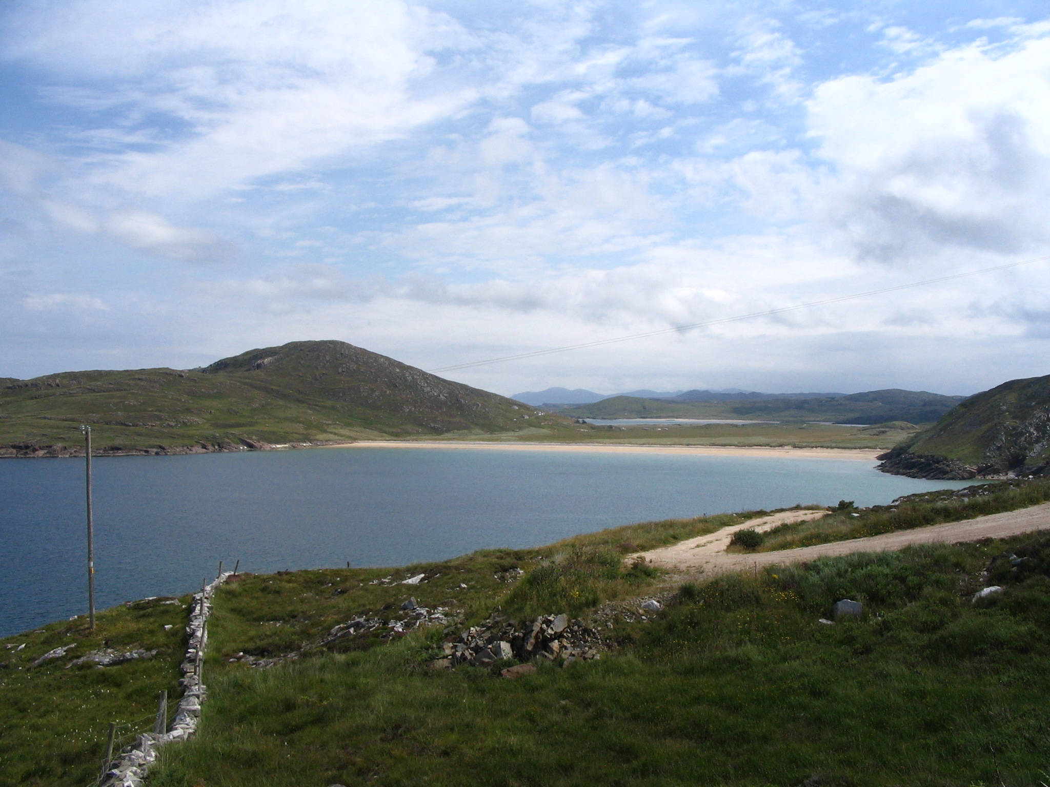 Tranarossann Bay- au pied du Crocknasleigh (163 m), Rosguill Peninsula